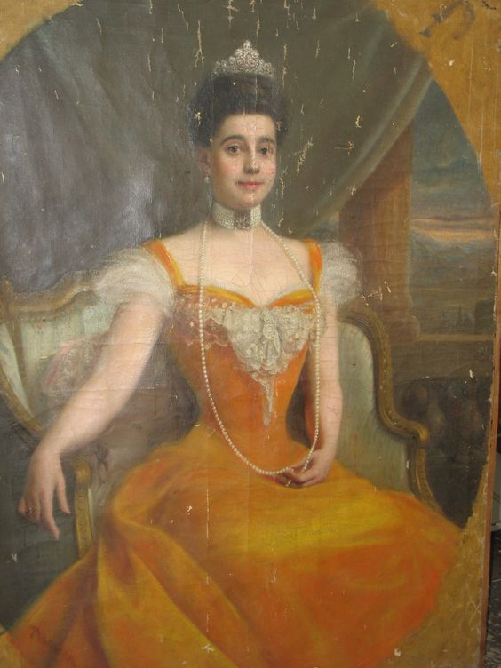 Хелена Потоцька, ур. Радзивіл. Автор Мойсей (Мойша) Лейбовський. 1904 рік. Атрибуція автора і портретованої здійснена Лобко Оксаною. Розташування: Вінницький художній музей. Портрет надійшов до Вінниці у 1935 році із Шепетівського музею.